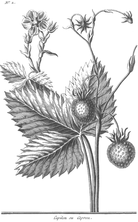 François Rozier, Cours d'agriculture, tome 5, planche 3, figure 2